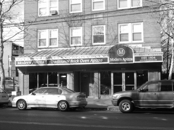 Modern Apizza in New Haven, CT.